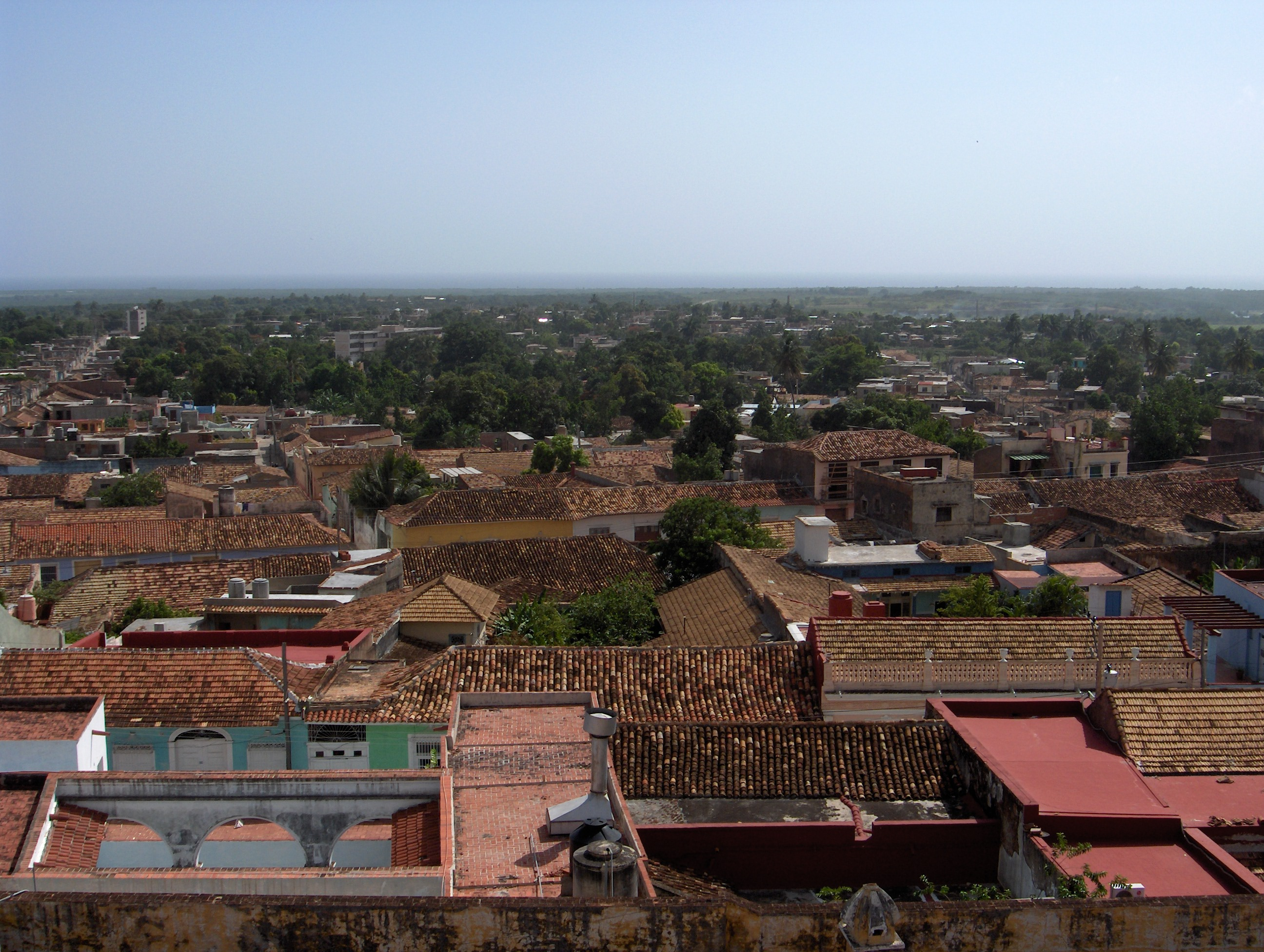 Vue sur la mer depuis les toits de Trinidad, Cuba.